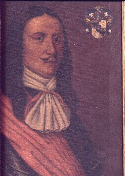 Johann von Sporck (ca. 1601-1679), österreichischer General